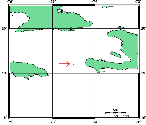 Une carte (projection Mercator) qui indique la situation de La Navase (Navassa Island) par rapport à Haïti, la Jamaïque, Cuba.